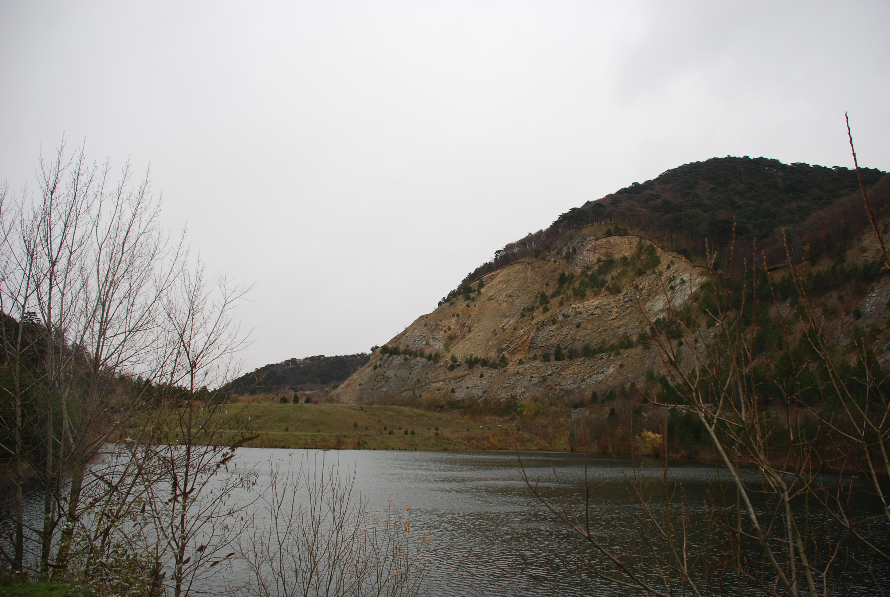 Abendstimmung am Teufelstein-Steinbruch